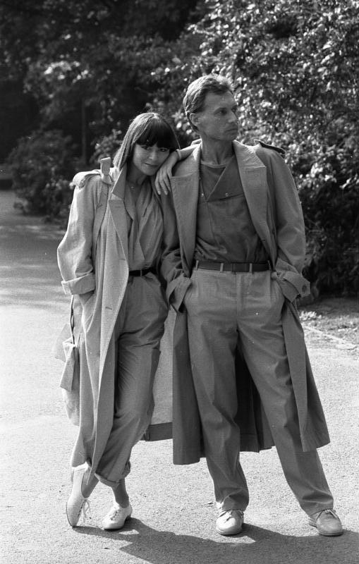 Berlin, Modeausblick ADN-ZB Settnik, 18.10.84, Berlin: Modeausblick ´85 Auch im nächsten Sommer bleibt für Damen und Herren die Trenchcoatform bei den Mänteln aktuell. Seit nunmehr 70 Jahren gibt es die Form, und sie hat sich mit wenigen Abwandlungen immer gehalten. Je nach Komplettierung ist der Gesamteindruck sportlich, wie in diesem Fall, oder elegant. Die Mäntel sind zumeist wadenlang.